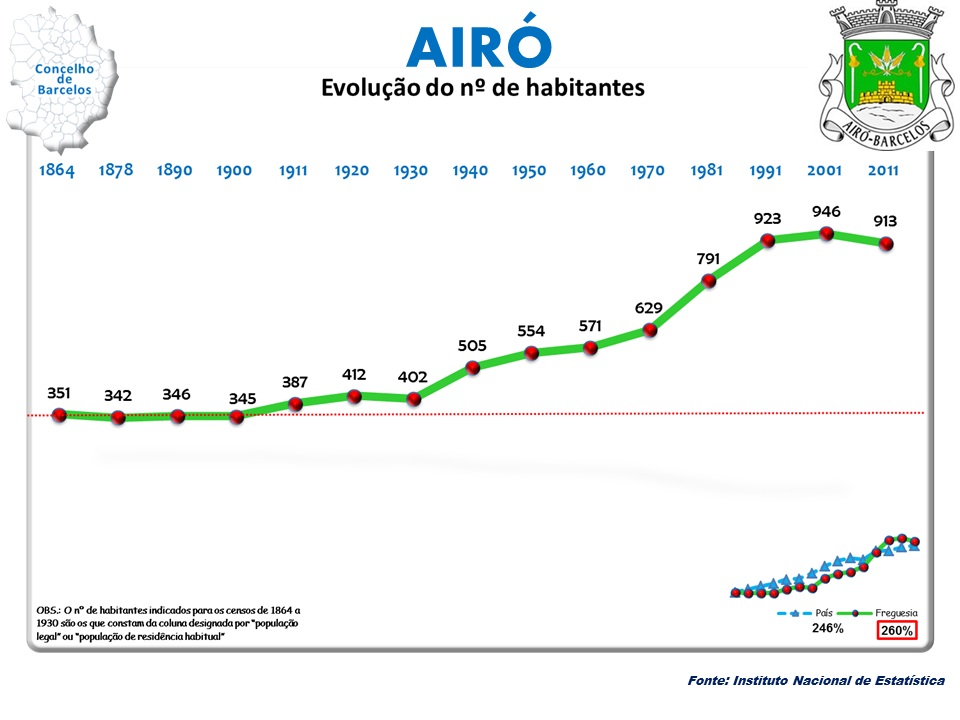 Censos 1864/2011